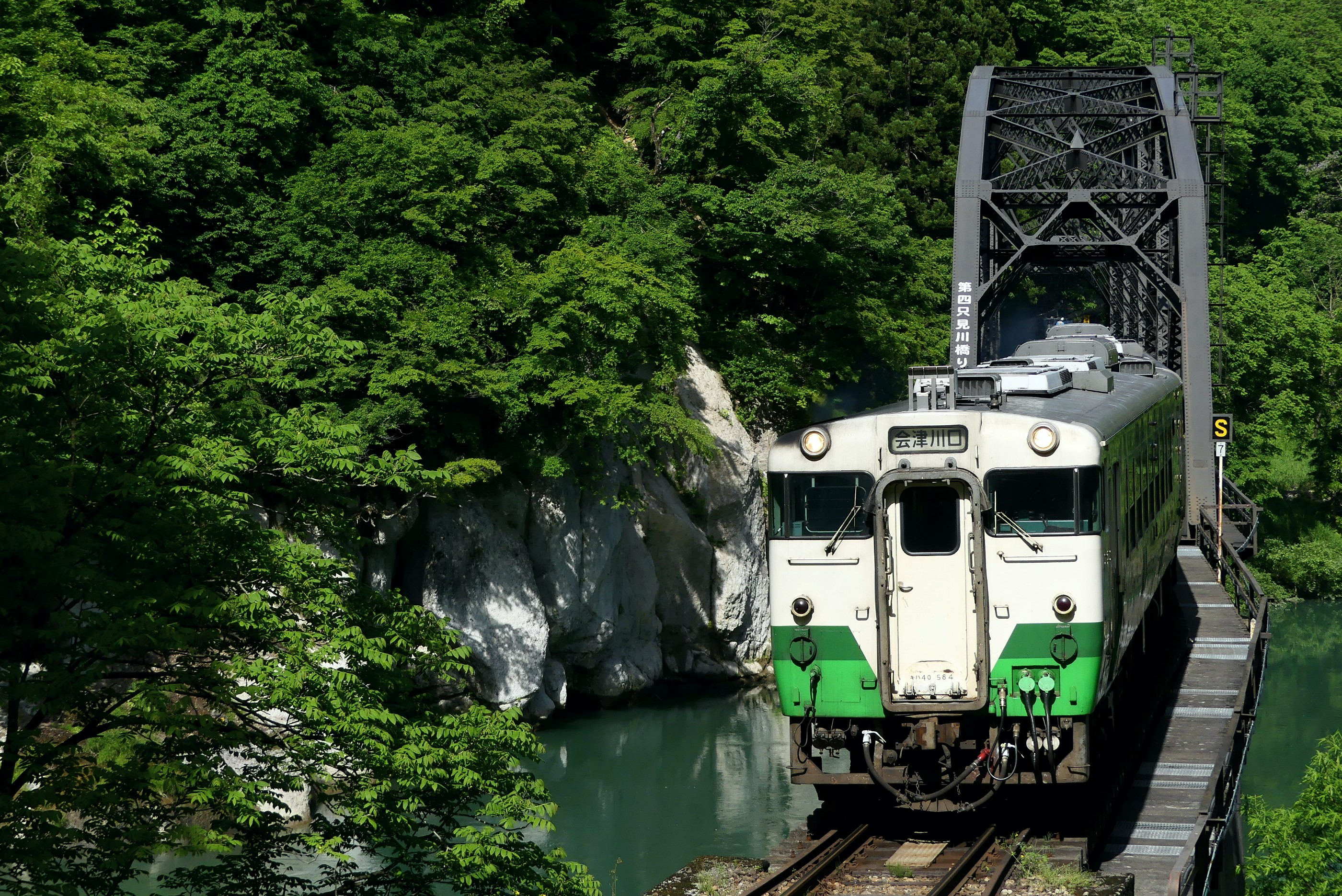 只見線キハ40形Panasonic Lumix DMC-FZ300